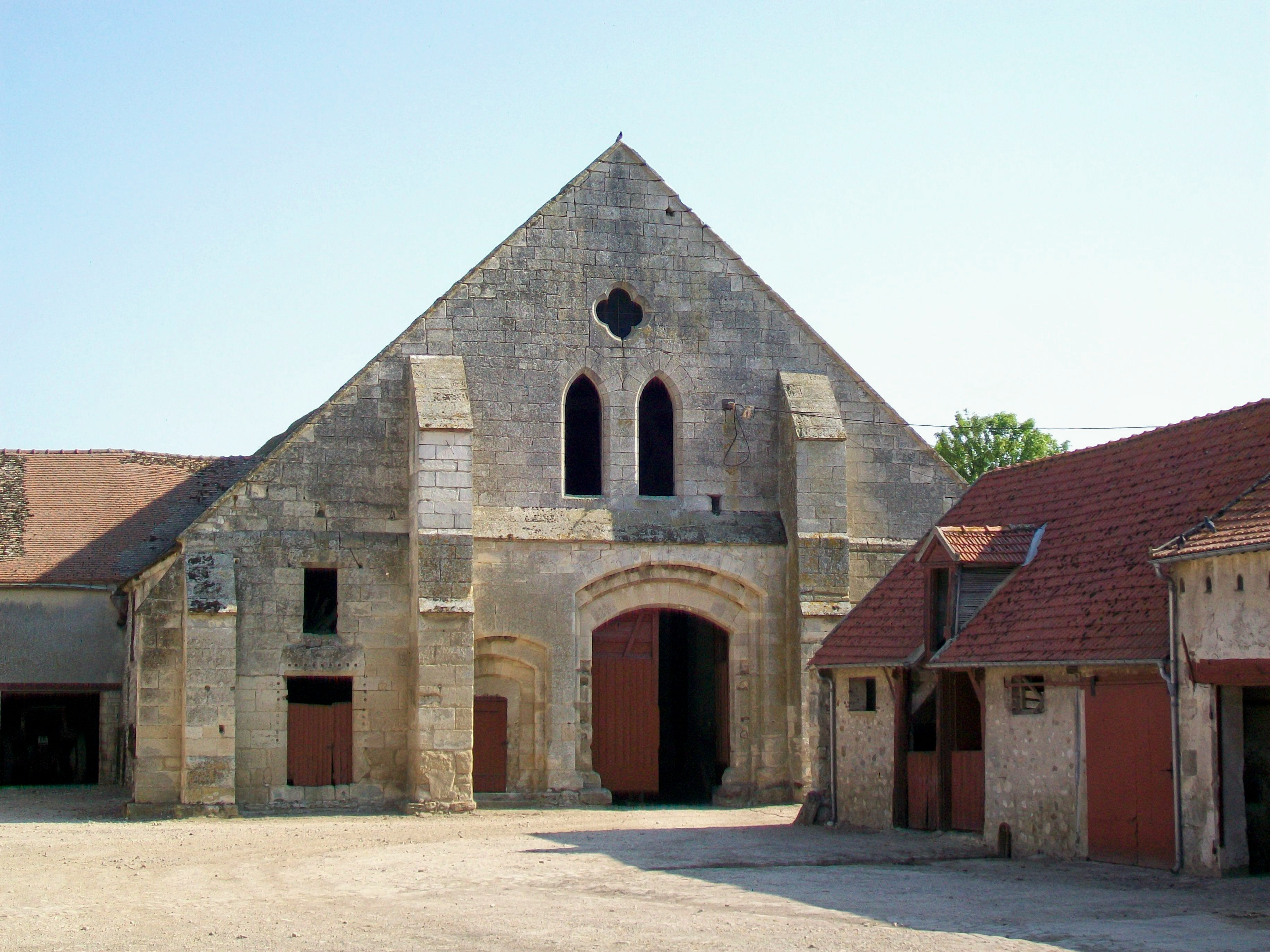 La grange de Fourcheret, écart de La Fontaine-Chaalis ; ancienne grange monastique de l'abbaye de Chaalis. Pignon sud avec l'association d'un grand et d'un petit portail caractéristique des granges de Chaalis. Le bâtiment est classé Monuments historiques depuis le 15 avril 1990.